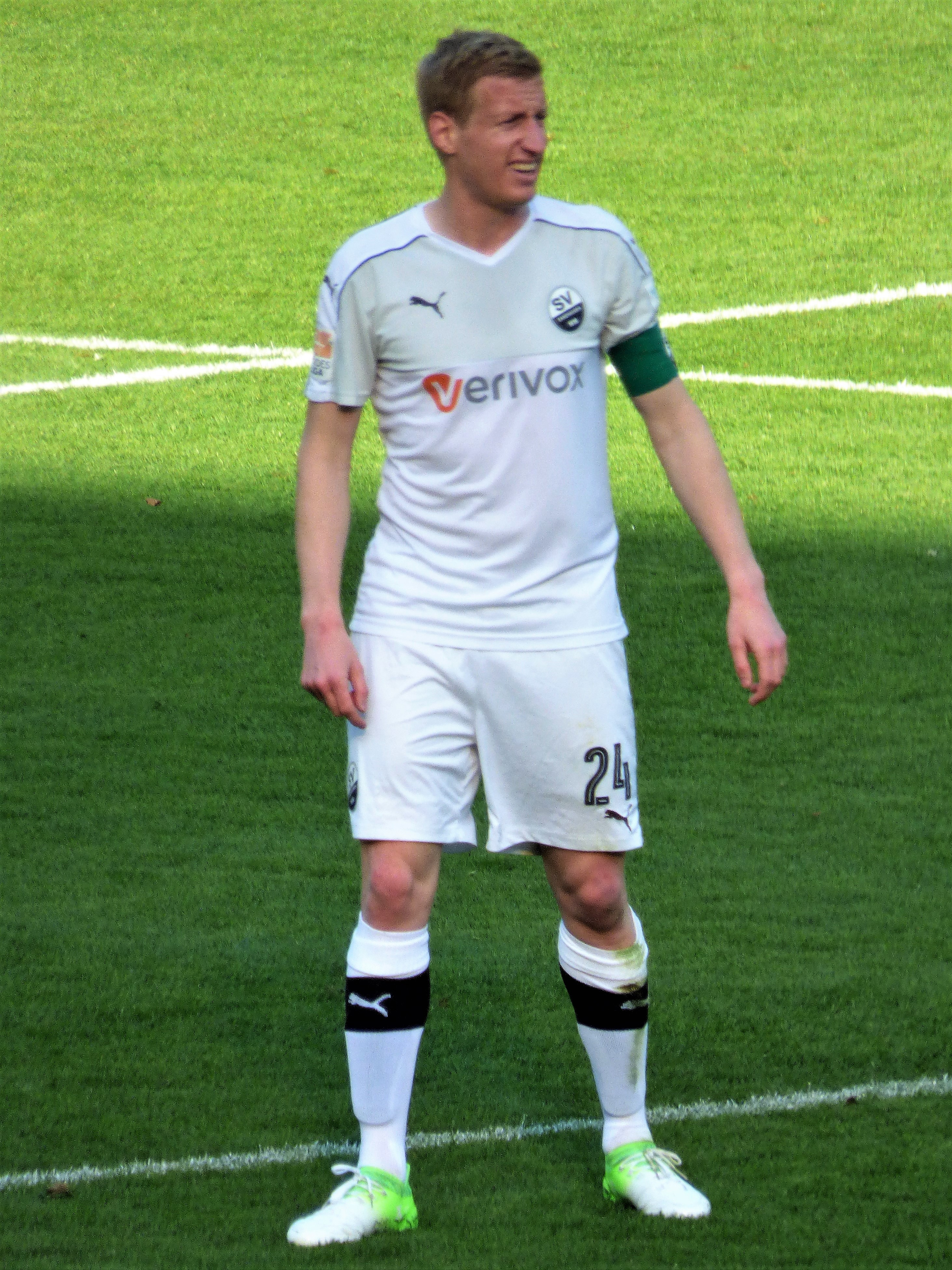 Philipp Klingmann im Trikot vom SV Sandhausen